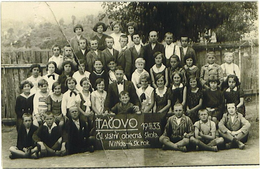 תמונת מחזור מביהס היסודי המעורב